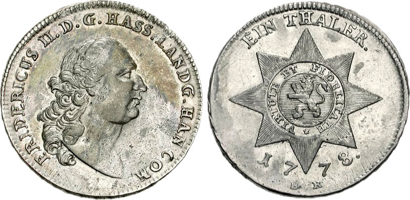 GERMANY, Hessen-Kassel. Friedrich II. 1864-1913. AR Sterntaler (23.34 g, 12h). Kassel mint; Balthasar Reinhard, mintmaster. Dated 1778. Head right / Hausorden vom Goldenen Löwen Star; date and B R below. Schütz 1962; Davenport 2303. VF, light adjustment marks and porosity.